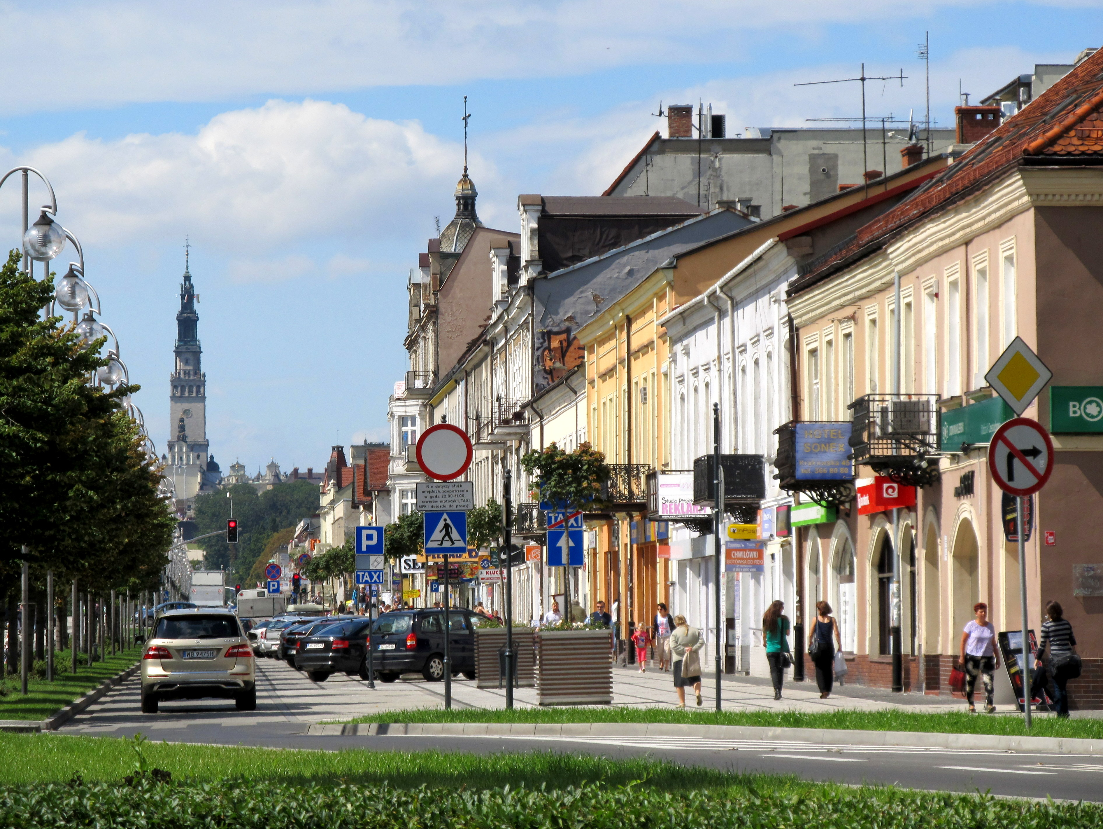 Częstochowa, układ urbanistyczny